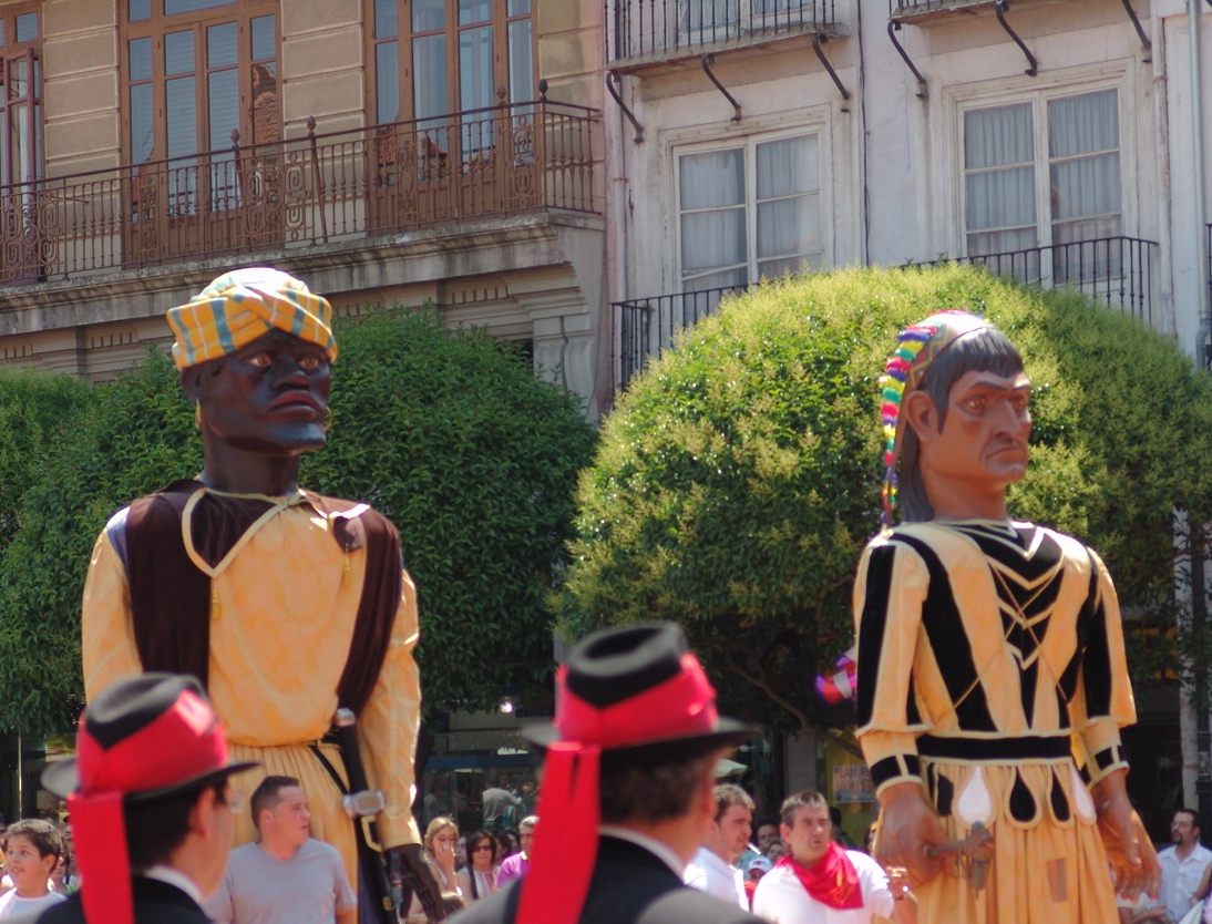 Fiestas de Burgos, los «Gigantones» África y América.